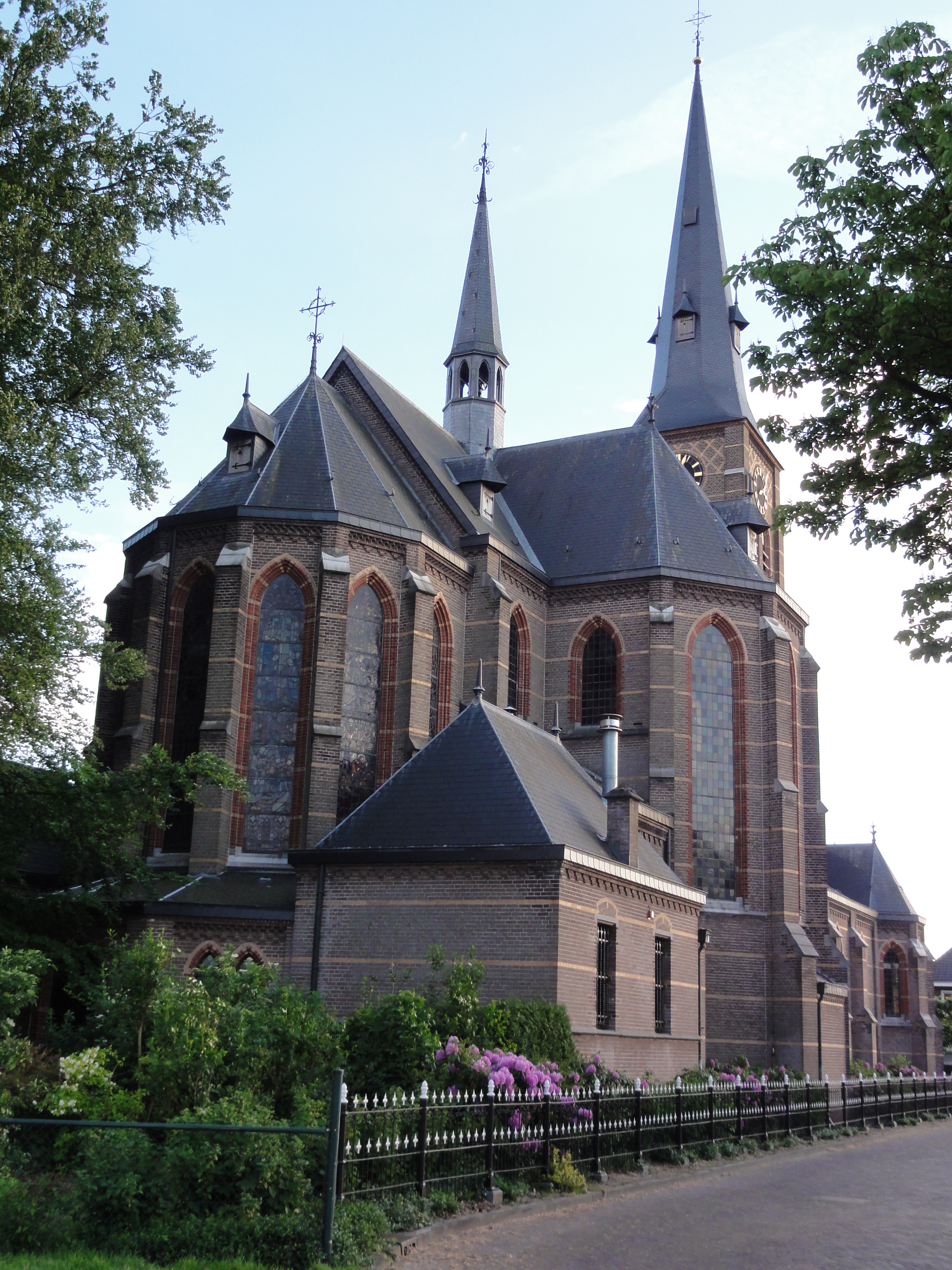 De Mortel